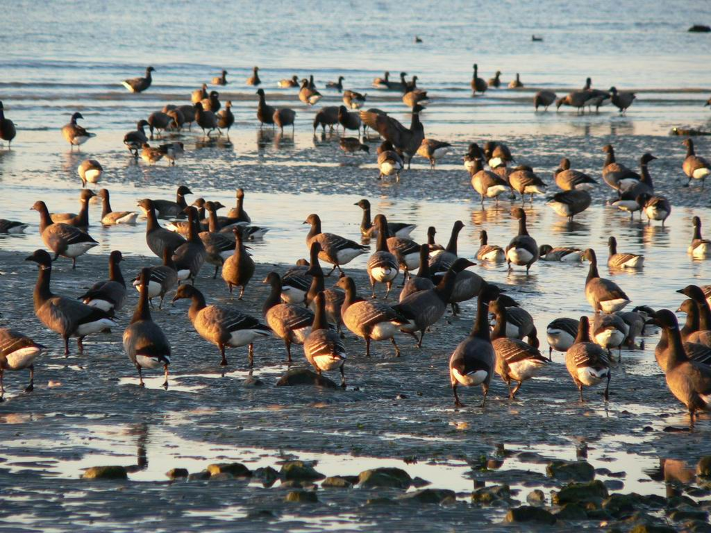 Hillion Oies Bernaches